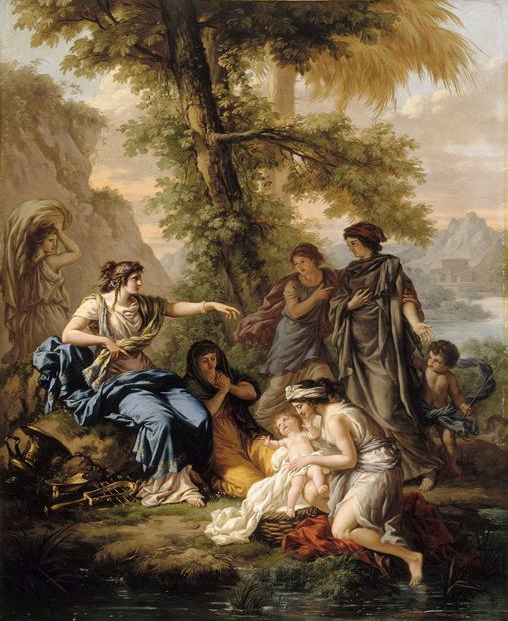 Moïse sauvé des eaux